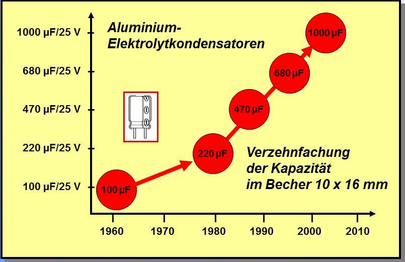 Miniaturisierung von Aluminium-Elektrolytkondensatoren durch immer höhere Aufrauung der Anodenfolie